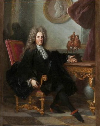 Portrait de Évrard Titon du Tillet (1677-1762)